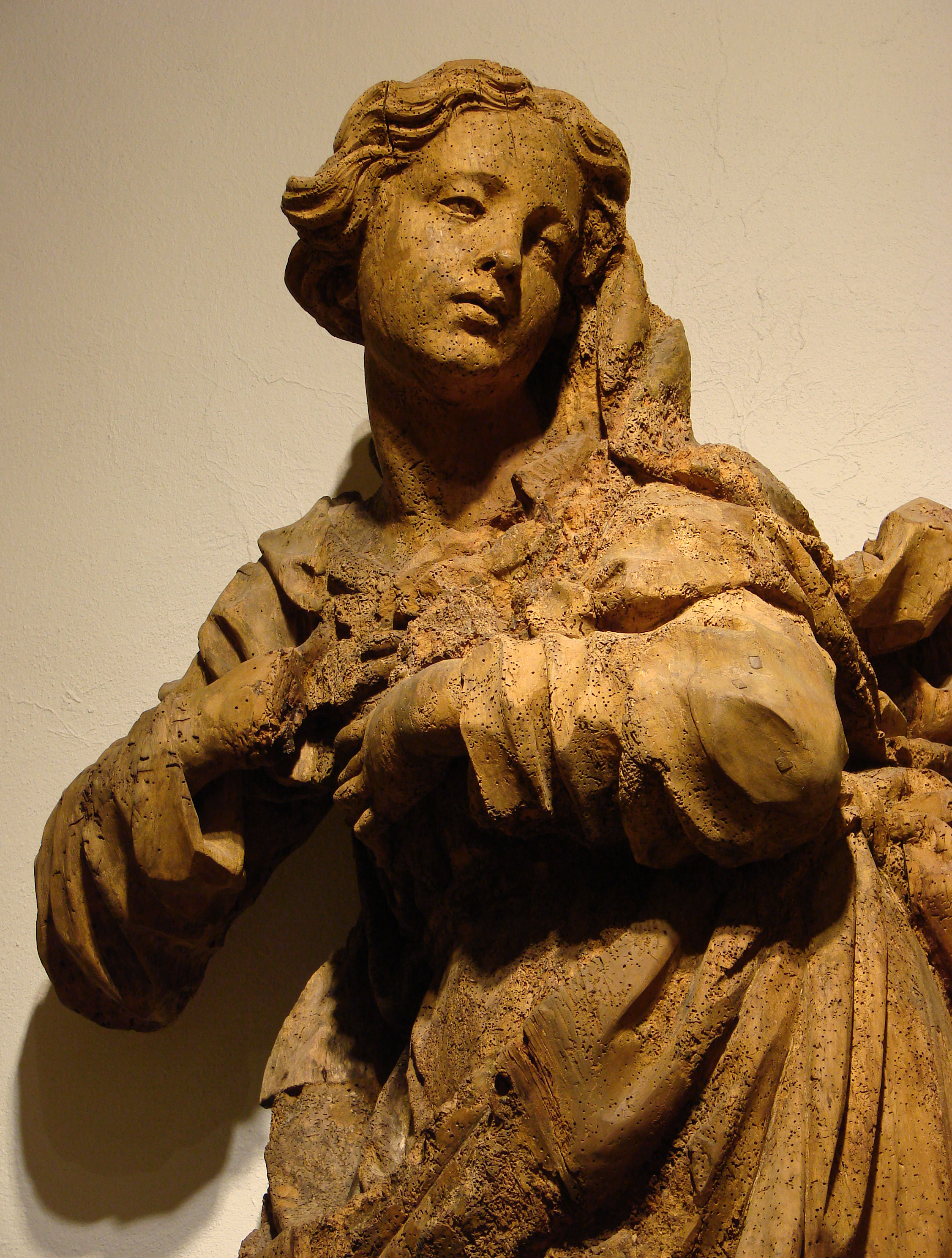 Vierge de l'Assomption, par Jean-Baptiste Bouchardon, architecte et sculpteur né en Haute-Marne (1667-1743). Bois sculpté. Musée de Chaumont.